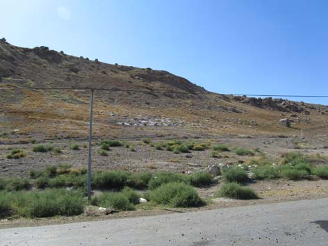 نمایی از قبرستان قزقلعه